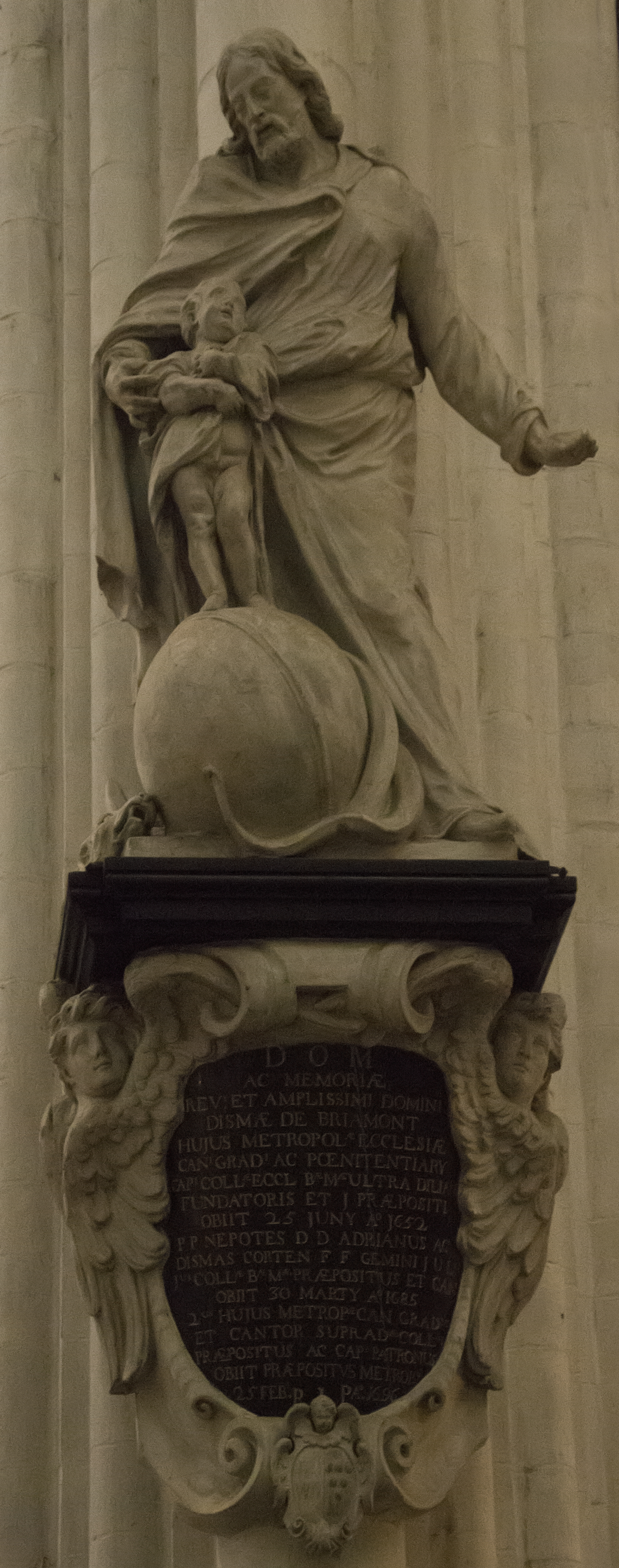 Lucas Faydherbe (1617-1697) Sint-Jozef met Christuskind op de wereldbol Sint-Romboutskathedraal 21-12-2018